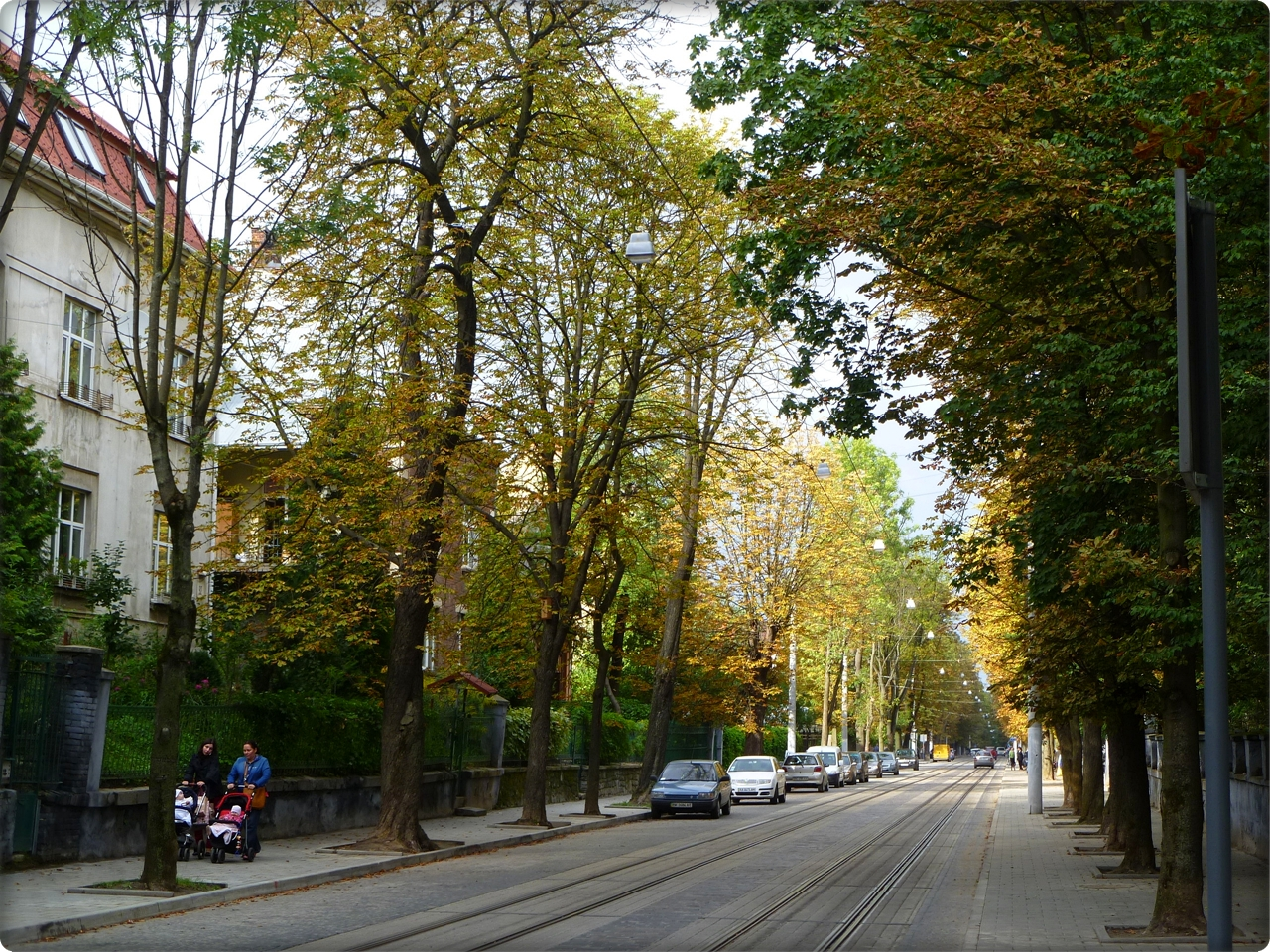 street in Lviv (Konovaltsja vulutsja)